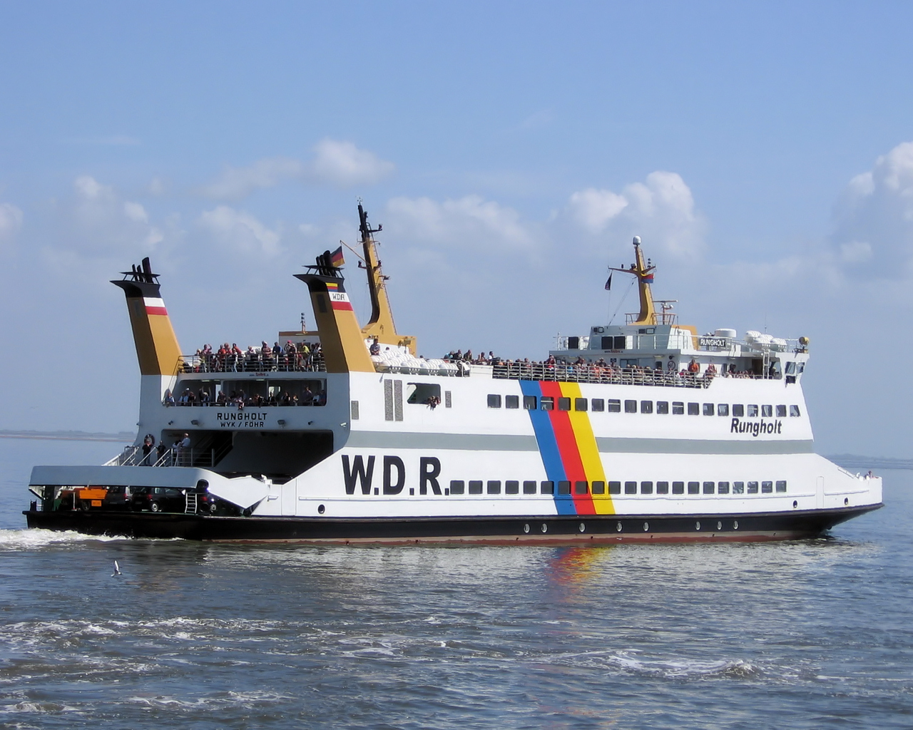 Autofähr- und Passagiermotorschiff Rungholt Baujahr: 1992 Werft: Husumer Schiffswerft (Nr. 1520) BRZ: 2265 Passagiere: 1190 PKW: 53 Länge: 67,84 m Breite: 14,80 m Tiefgang: 1,96 m Maschine: 2 MaK-Motoren Leistung: 1.880 kW Geschw.: 12,5 Knoten